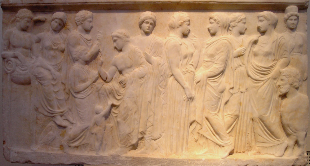 Relief votif en marbre pentélique trouvé à Néo Phaliro en Attique. Une inscription sur la base en poros indique que le relief était dédié par Xénokratéia au dieu du fleuve Céphise. Il représente treize figures en tout. Au milieu de plusieurs divinités, le dédicant présente un enfant, Xéniades, à Céphise qui occupe la place centrale sur le relief. À gauche, Apollon est assis sur le tripode delphique, ses pieds reposant sur l'omphalos. Un aigle se tient à proximité. À droite, Achéloos est montré sous la forme d'un taureau anthropomorphisé. Vers 410 a. C. Musée archéologique national, Athènes, n° 2756.